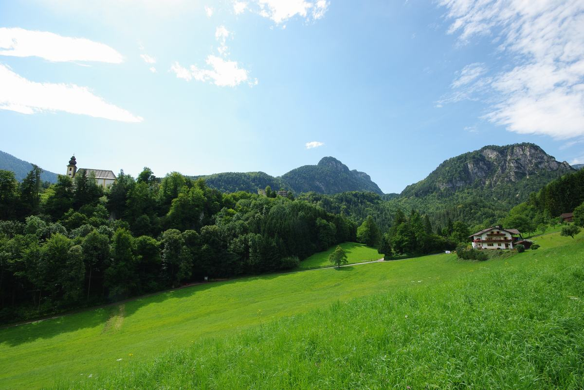 St. Pankrazkirche, Ruine Karlstein, Müllnerhorn und Gebersberg, vom Sieben-Palfen-Weg aus fotografiert